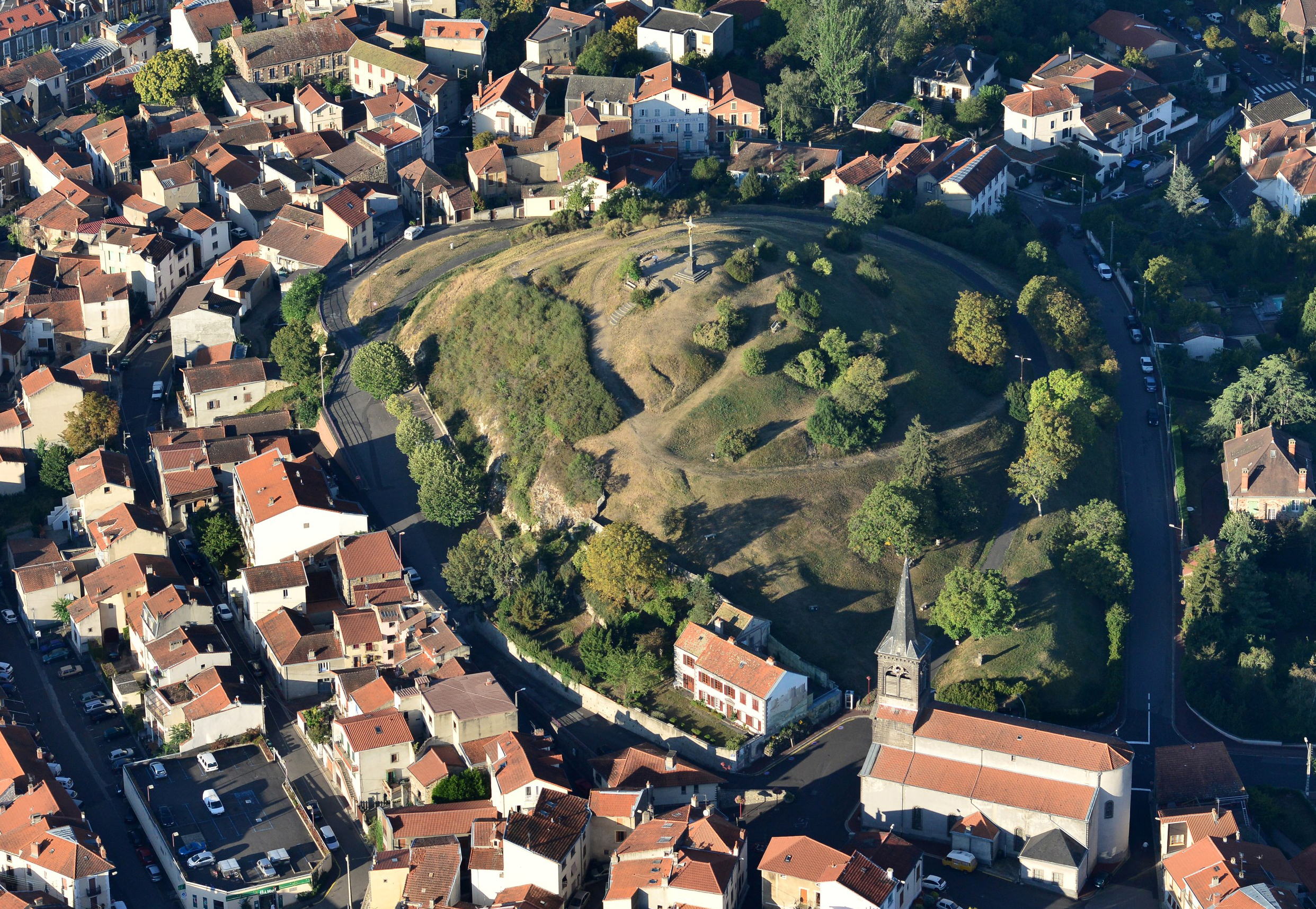 la calvaire en vue aerienne